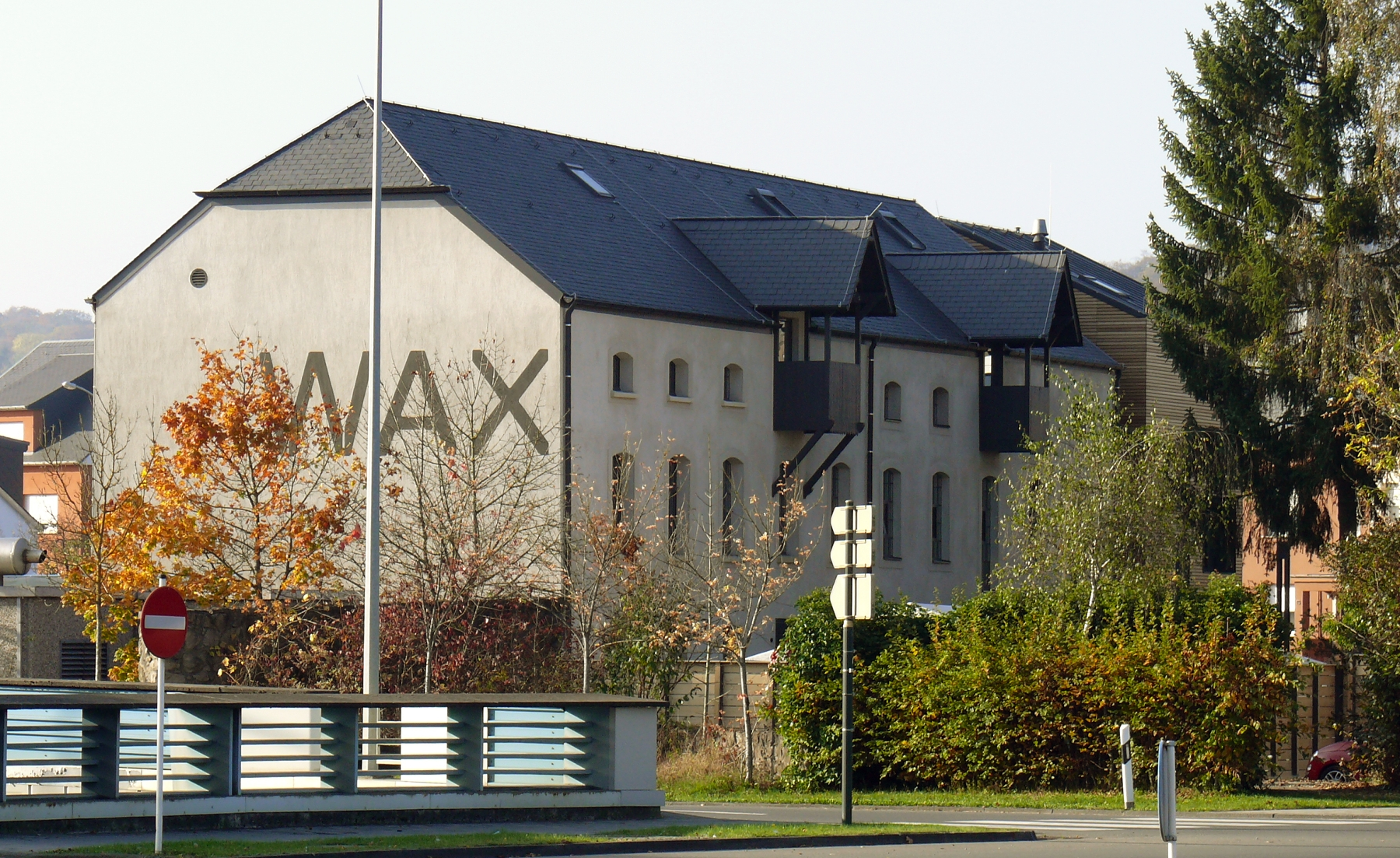 Centre socio-culturel WAX zu Péiteng/à Pétange.